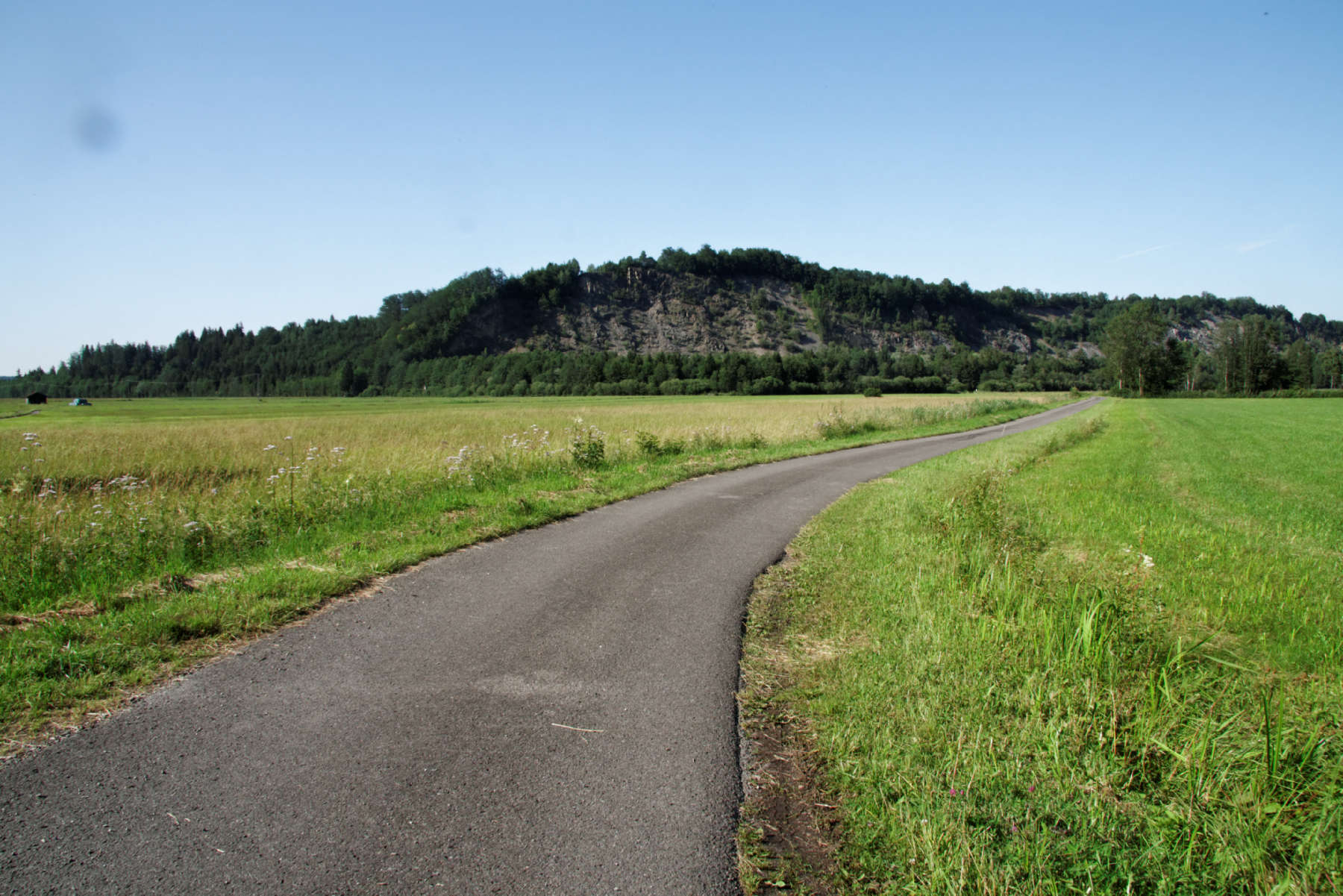 Blick von Südwesten auf den Langen Köchel im Murnauer Moos